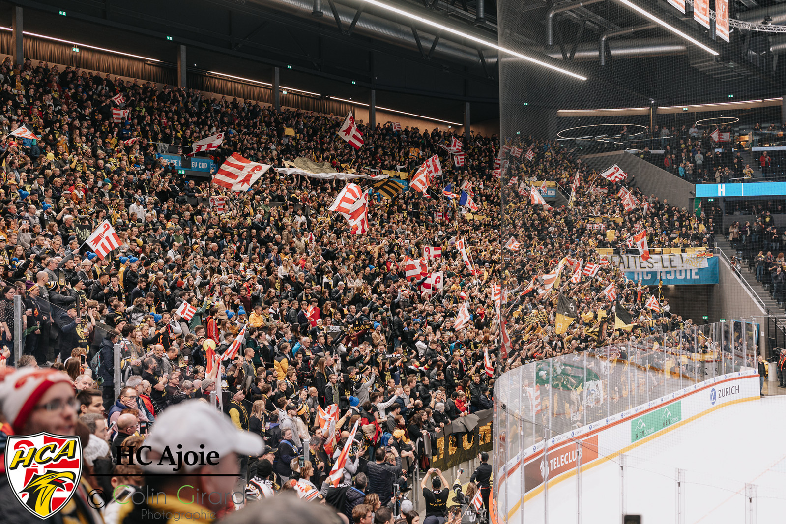 HC Ajoie, Hockey sur Glace, victoire en coupe de Suisse